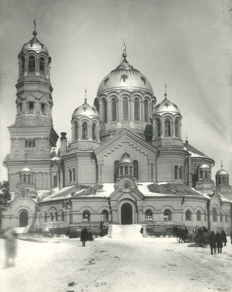 Кафедральный собор в г. Самаре. Без даты. Фотофонд ЦГАСО